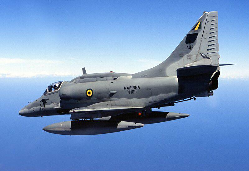 Arquivo liberado pela Marinha do Brasil através de projeto GLAM com Wiki Educação Brasil